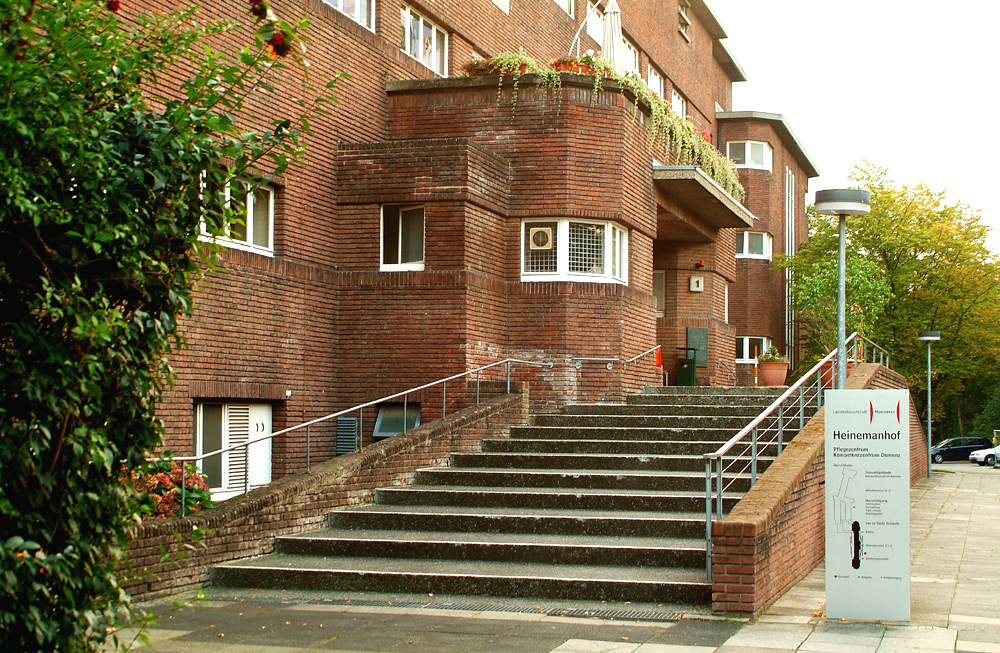 Treppenaufgang zum Haupteingang des Heinemanhofes ...